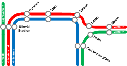 Rutene for Haslesvingen/T-baneringen når Haslesvingen er bygget.